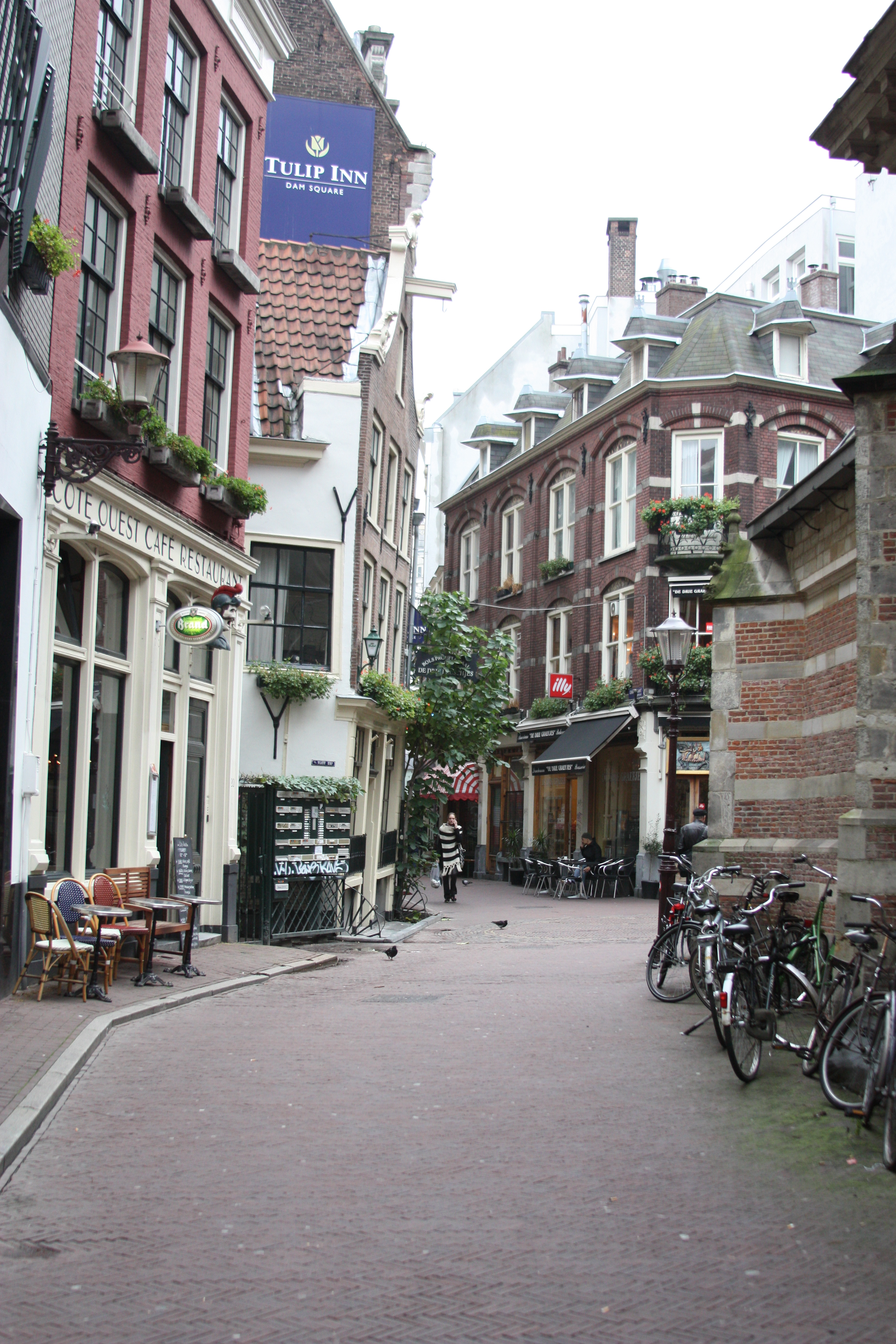 Amsterdam Zentrum